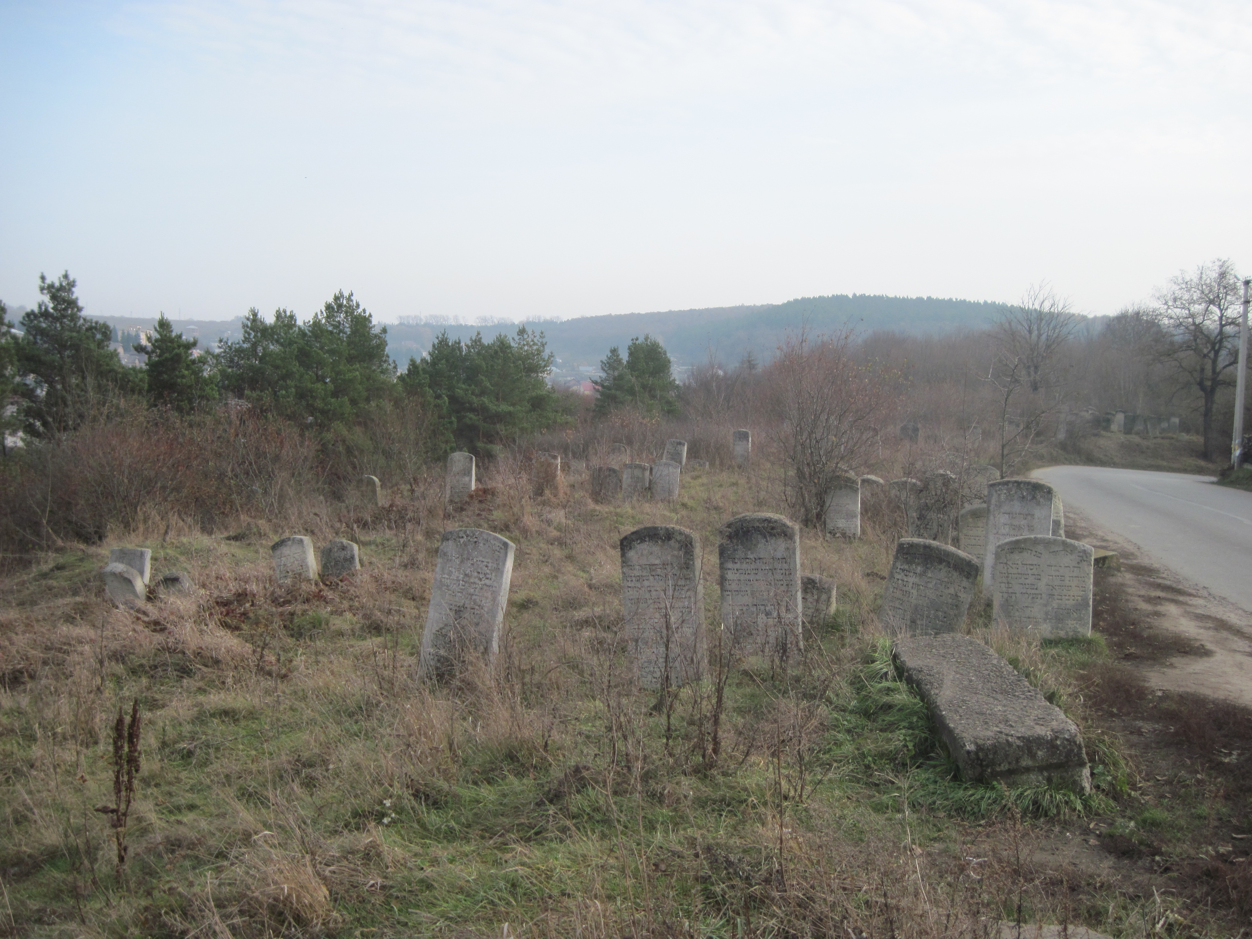 Єврейський (діял. жидівський) цвинтар, Бучач, осінь 2014